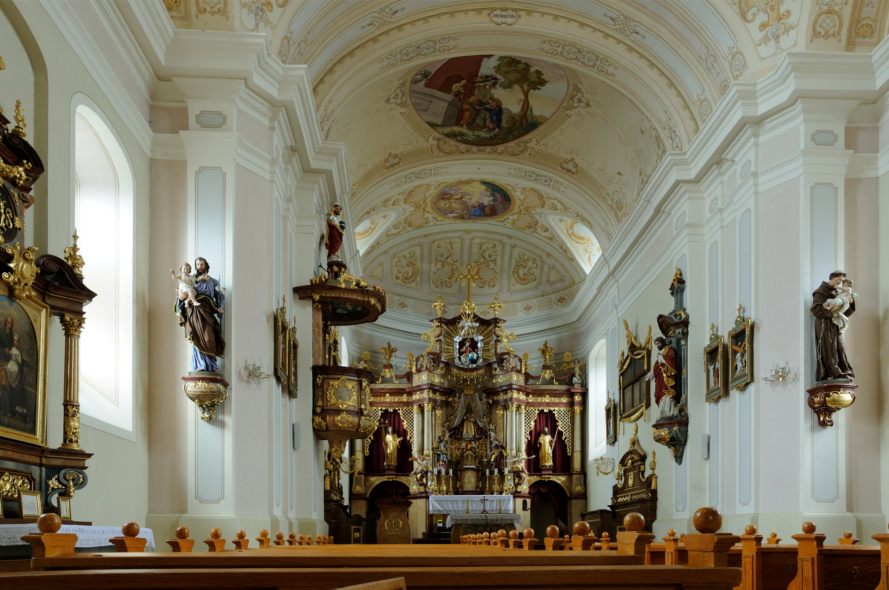 Der barocke Altar in der Kath. Filialkirche Maria Schutz am Bründl.